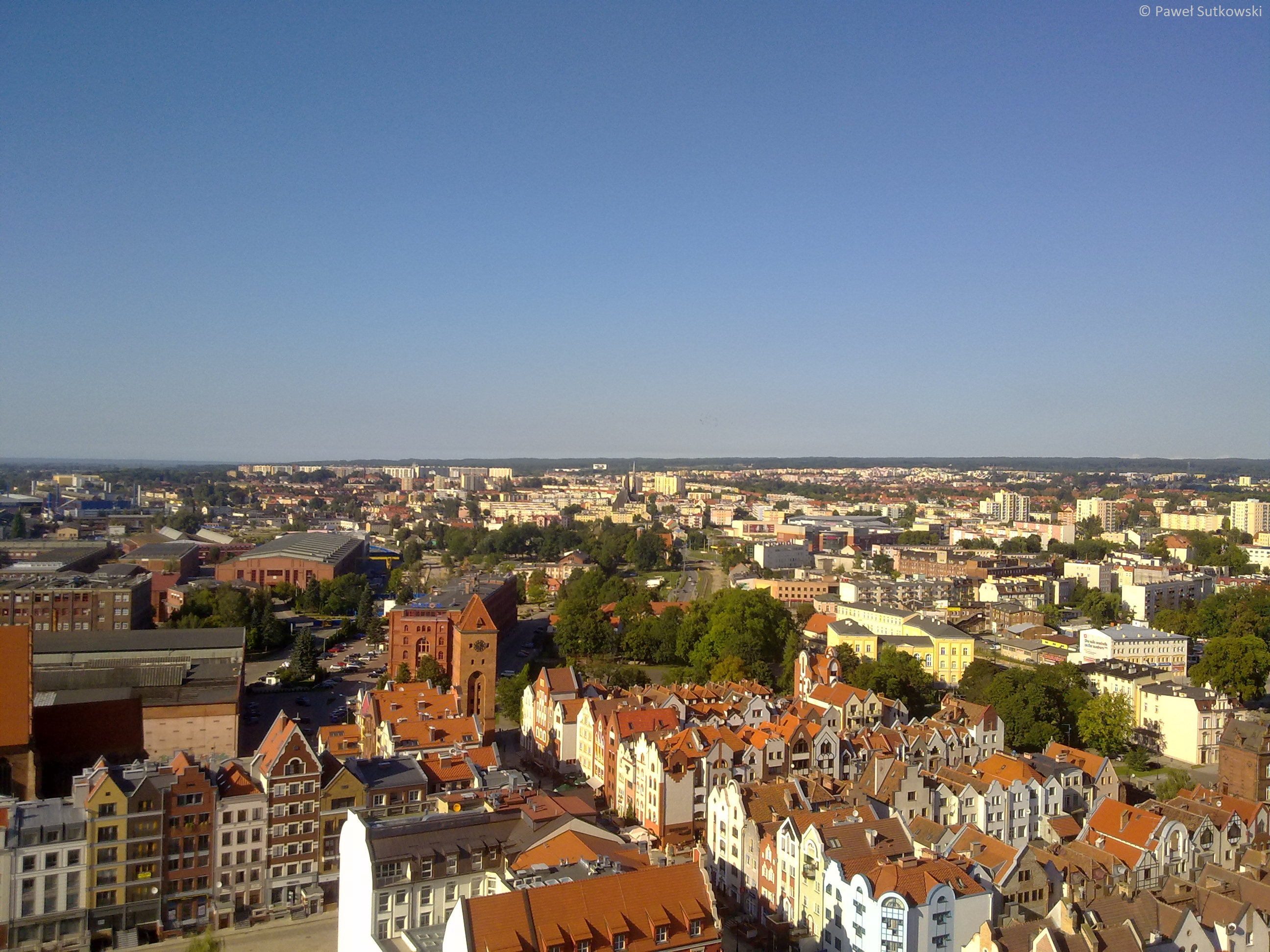 Elbląg - układ urbanistyczny Starego Miasta (zabytek nr A-514)